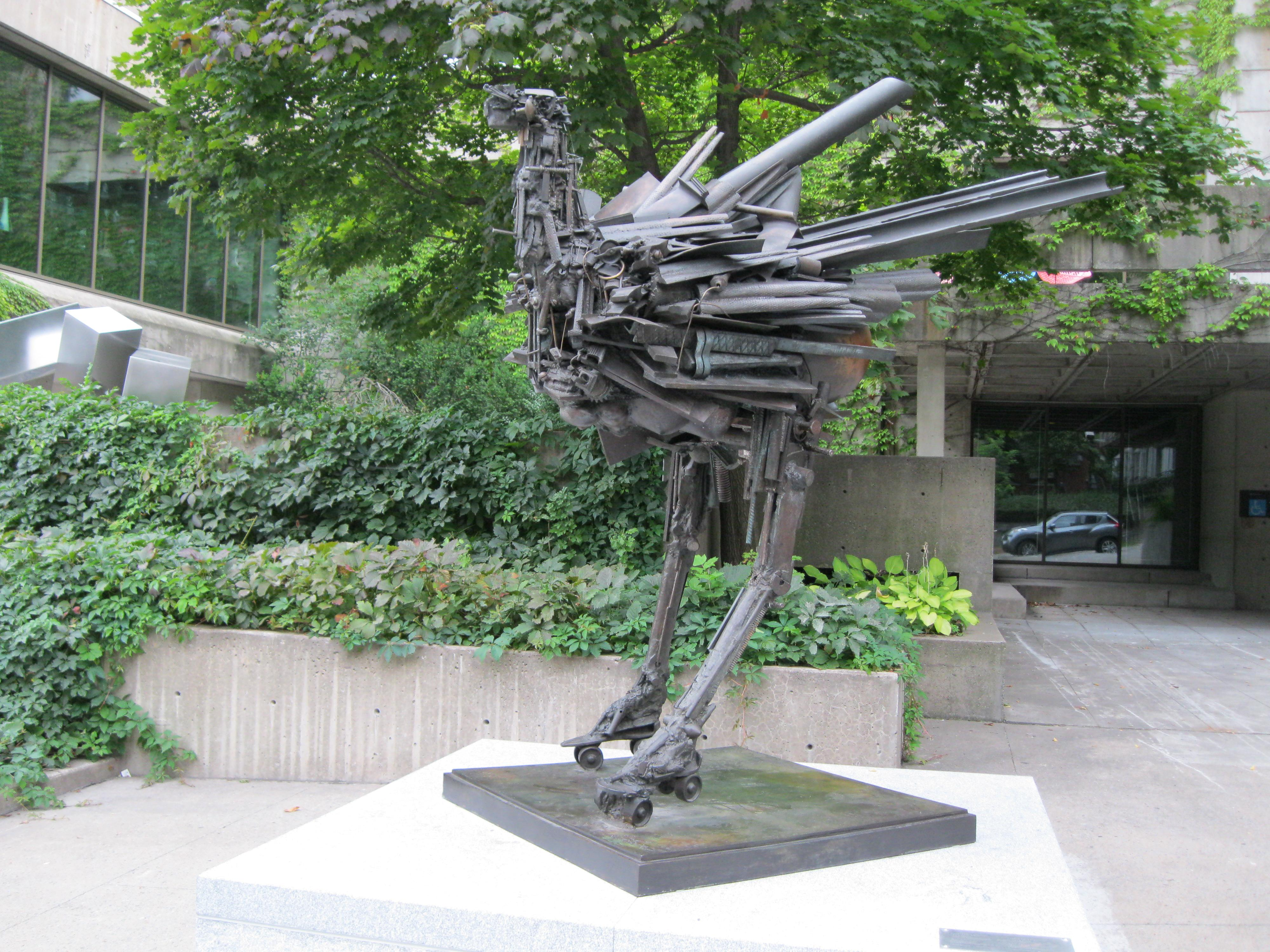 Fanny Fanny (1990), par César Baldaccini, MBAM